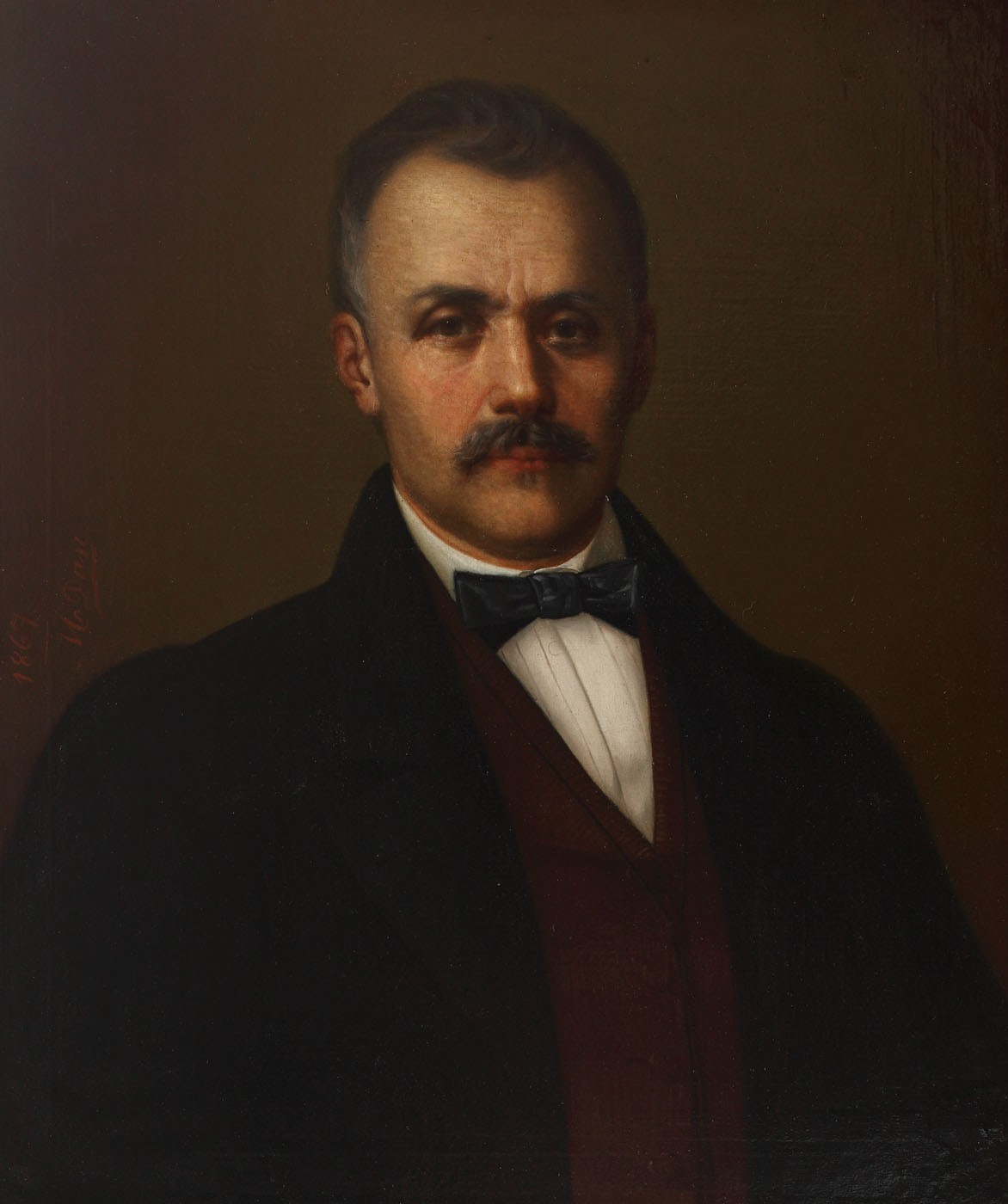 Portretul lui Ion Carp - colecție particulară